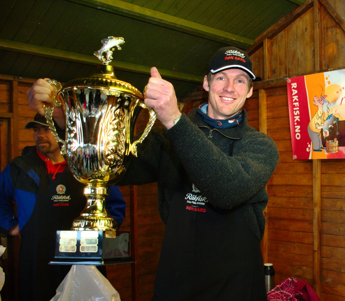 Røn Gard som ble vinnere av fagprisen under Norsk Rakfiskfestival i 2010